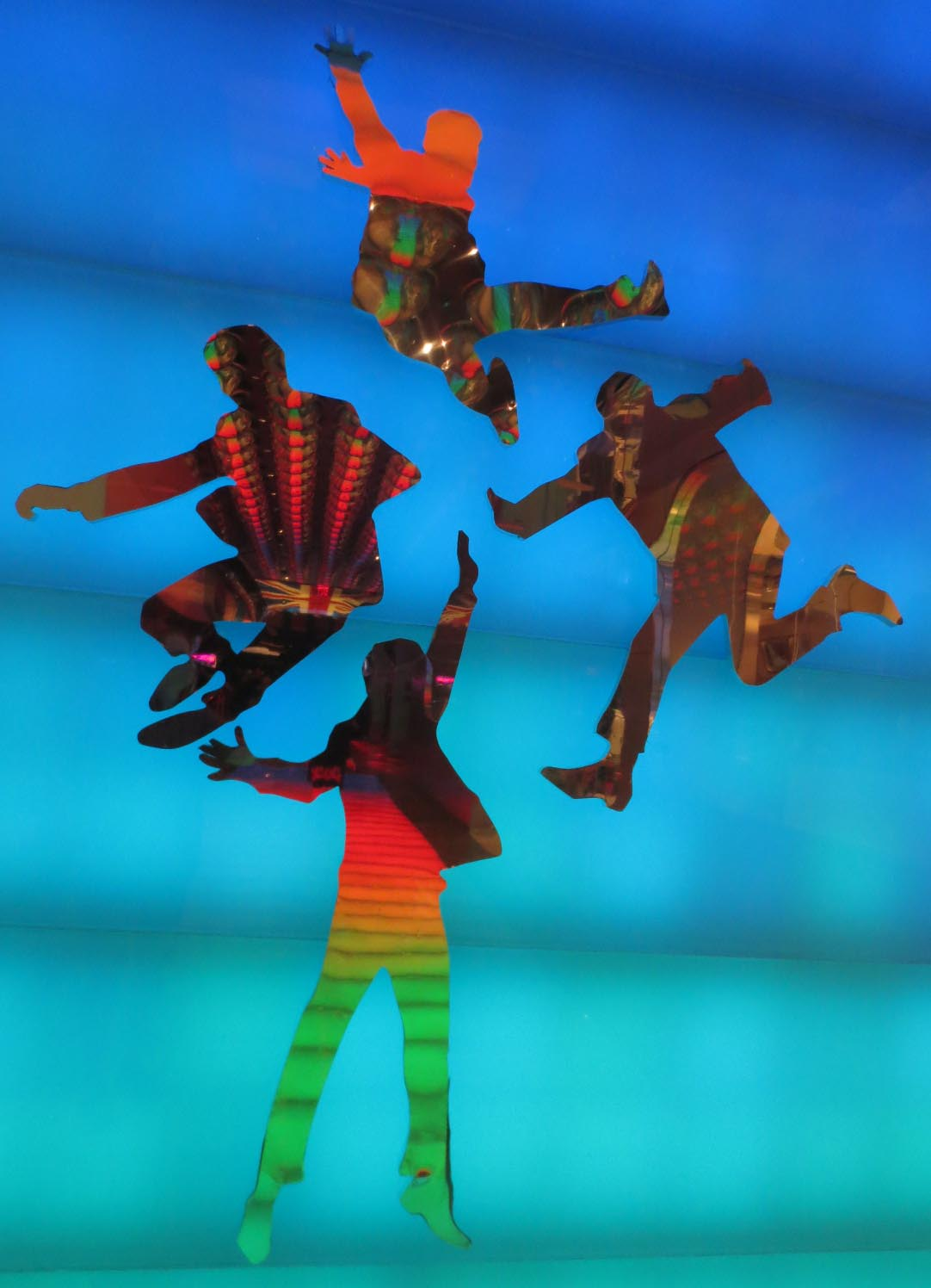 Les Beatles à Las Vegas. Saut dans les airs. Entrée du théâtre du Mirage. Mars 2016.